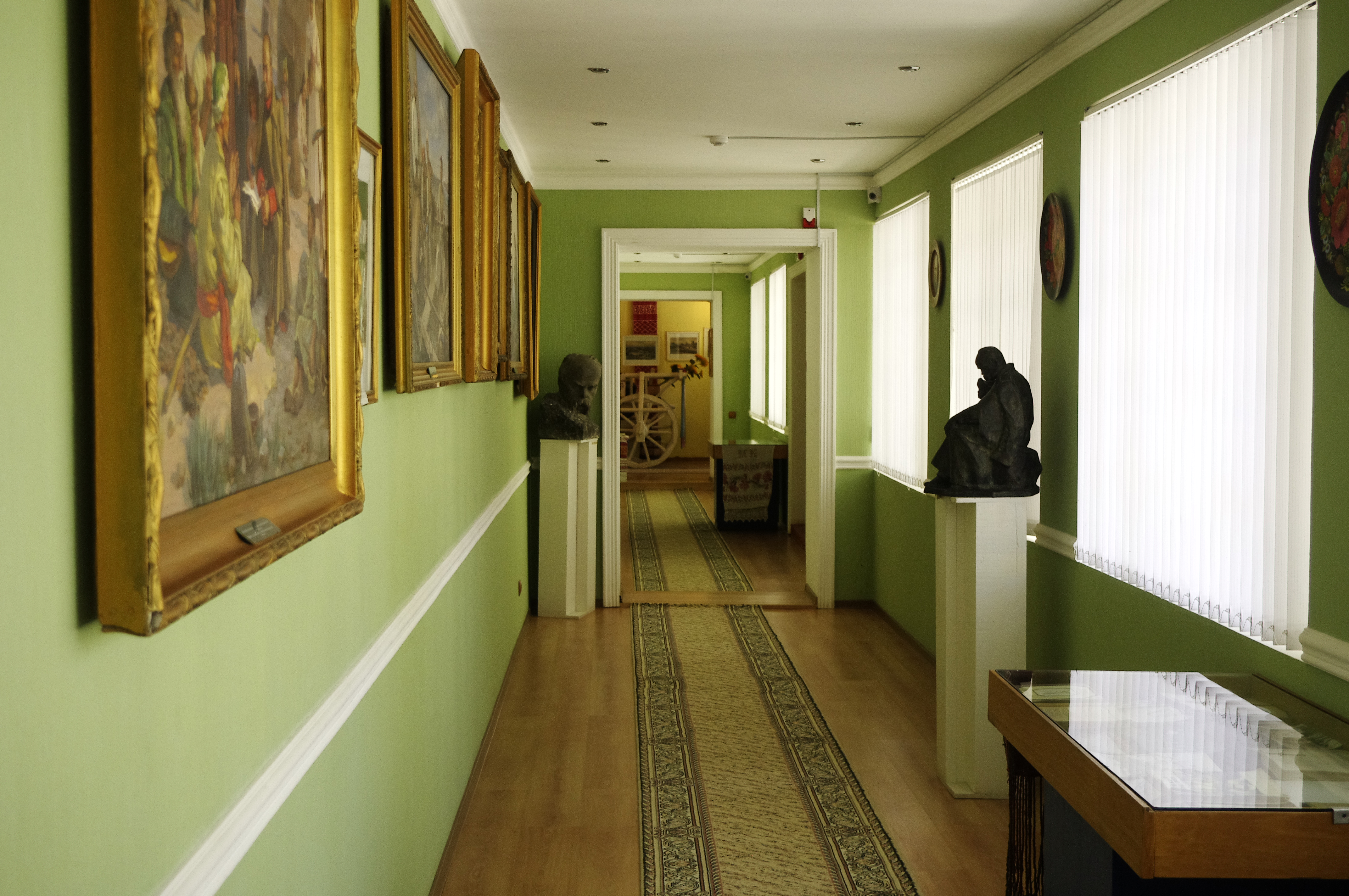 The making of this document was supported by Wikimedia Polska. To zdjęcie zostało wykonane podczas Wikiwyprawy 2015. Wszystkie zdjęcia z wyprawy możesz zobaczyć w kategorii: Wikiwyprawa 2015. English | polski | +/− To zdjęcie zostało załadowane dzięki współpracy z firmą Hyperbook. polski | +/− To zdjęcie zostało załadowane dzięki współpracy z firmą: Kopex Group. English | polski | +/−